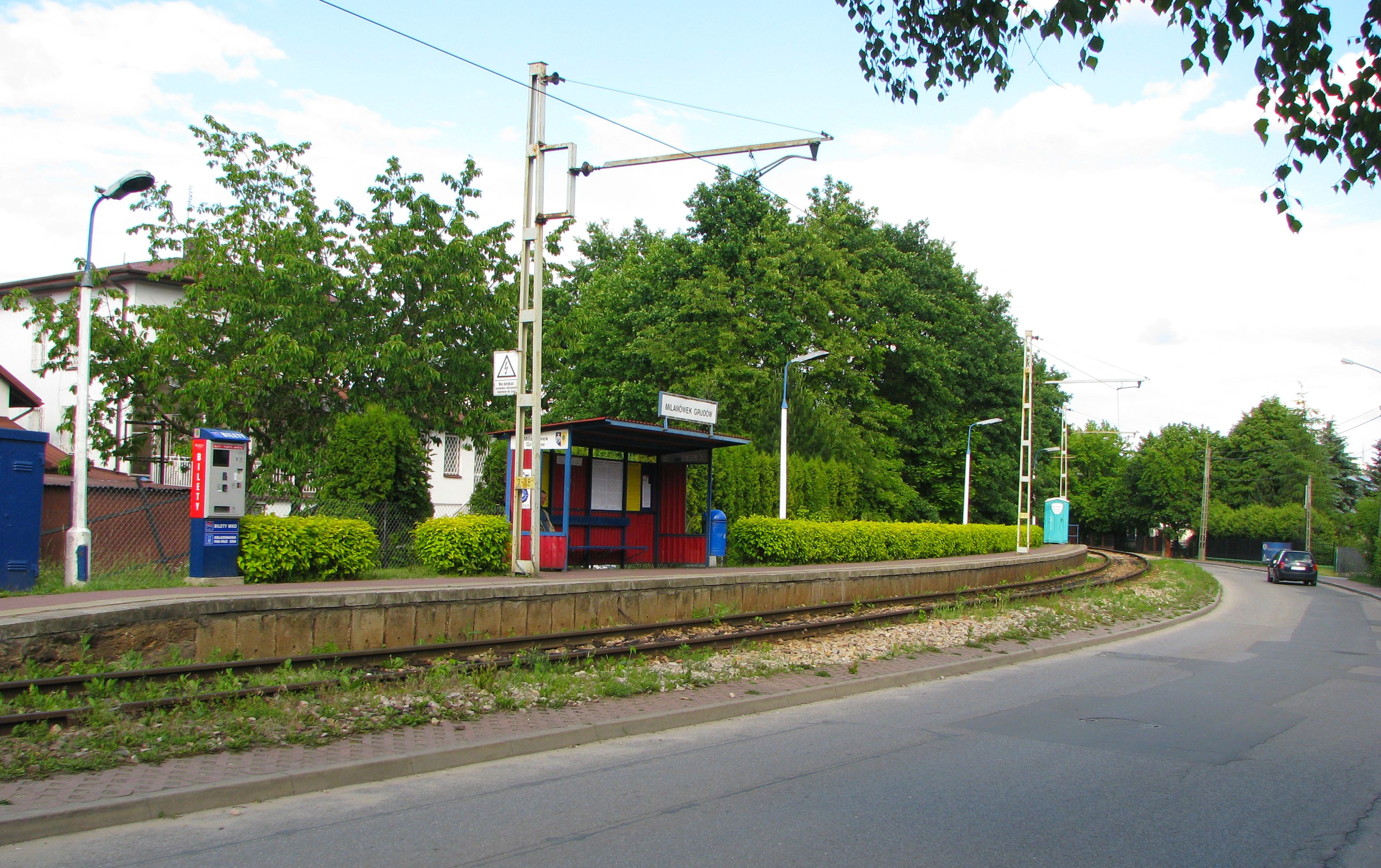 Milanówek Grudów - przystanek Warszawskiej Kolei Dojazdowej